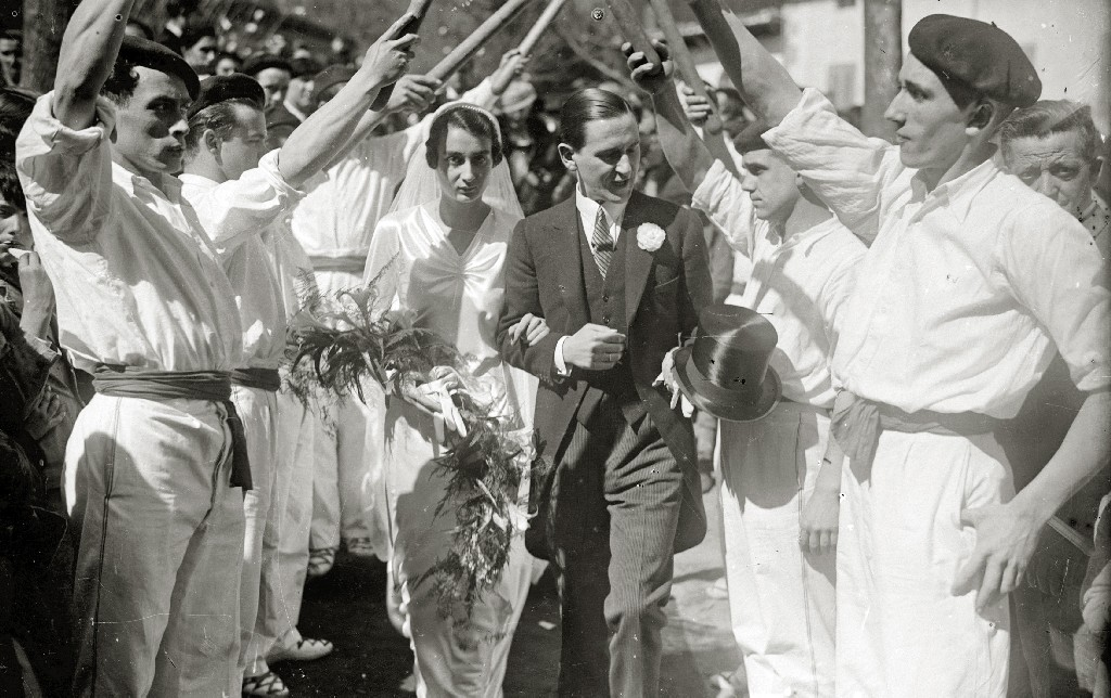 Título original: Celebración de la boda del político bergarés, Telesforo Monzon con María Josefa de Ganuza y Lardiazabal (7/9) Localización: Guipúzcoa